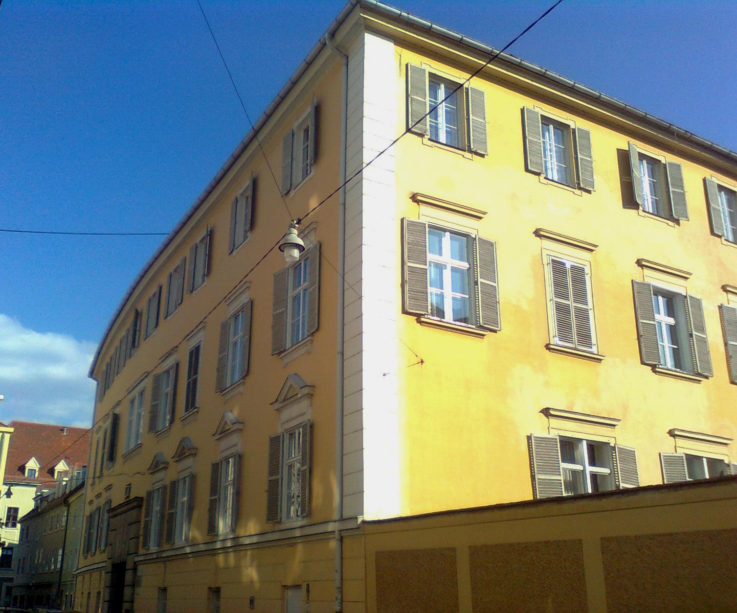 Bischöfliches Palais in Graz, Steiermark